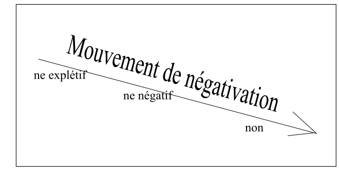 tableau sur la tension de négation, d'après les travaux de Gustave Guillaume sur la psychomécanique